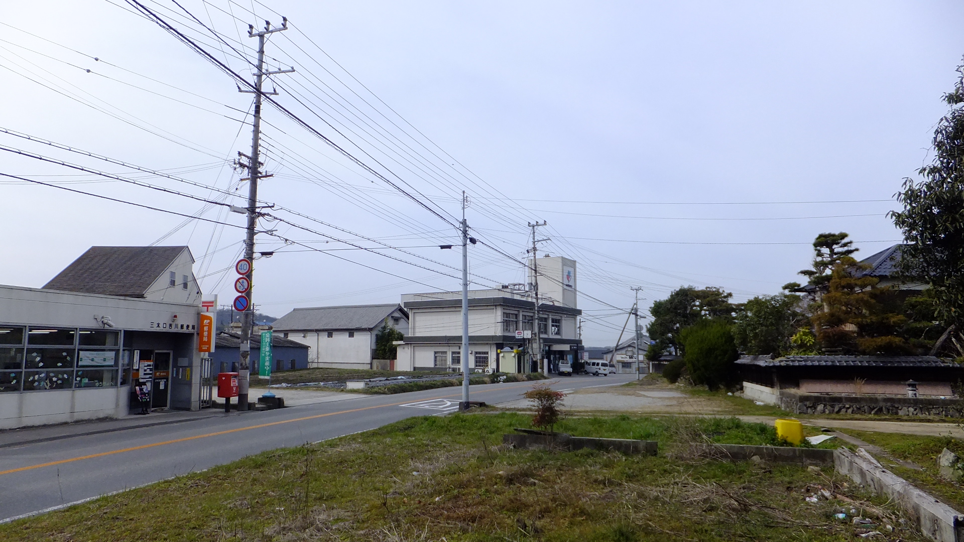 兵庫県三木市口吉川町殿畑 兵庫県道20号加古川三田線